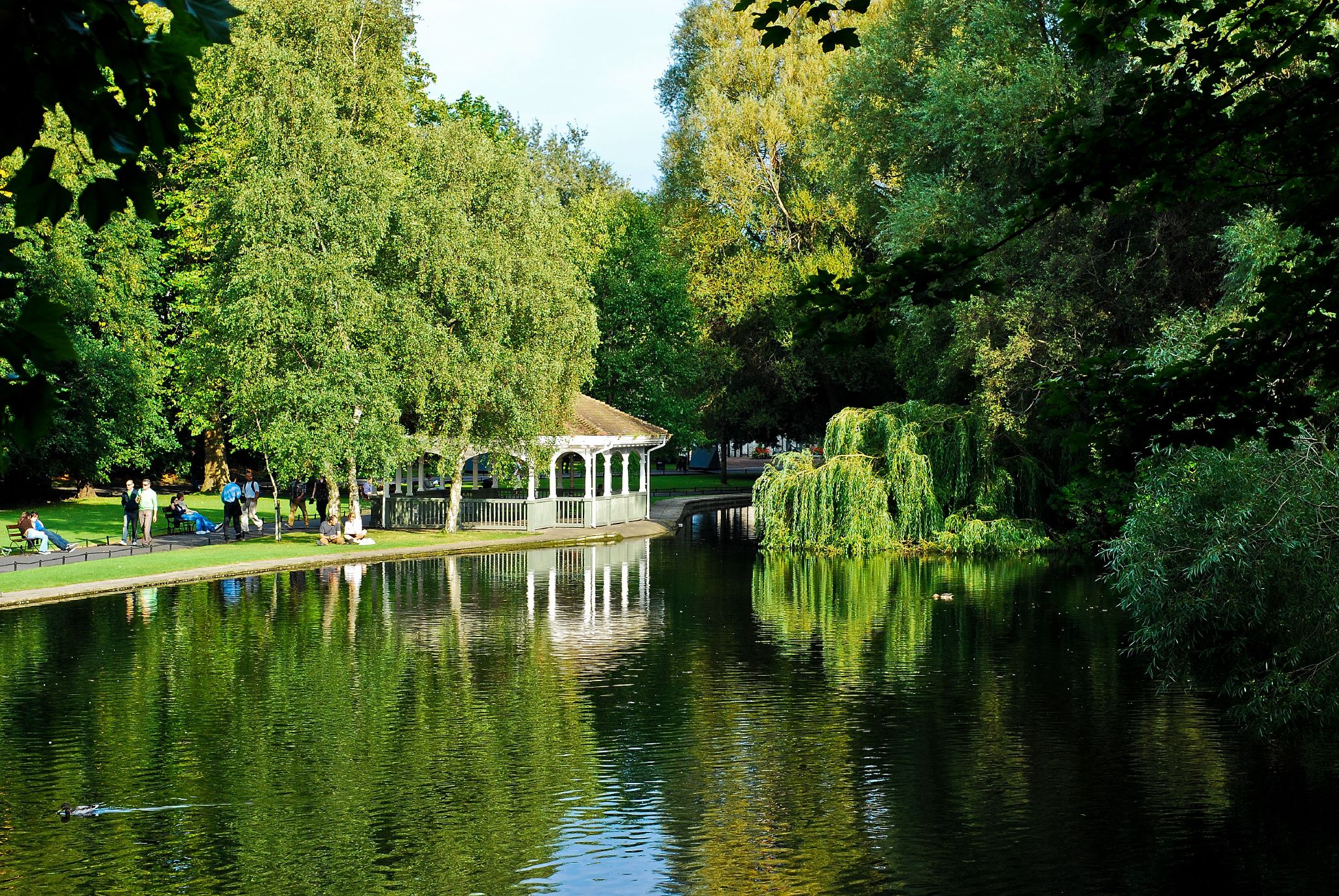 St. Stephens Green